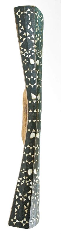 Schild. Smal lichtgebogen houten schild, zgn. dansschild. Het werd gebruikt bij initiatiedans van jongelingen. Het schild is afkomstig uit de familie van mevrouw Smit-Groot. Dit Molukse (van Seram of Halmahera) schild werd verworven op de noordkust van Nederlands Nw. Guinea en was, volgens de familieverhalen, in het bezit van J. van Hasselt, pionier van de Protestante zending in Noord Nw. Guinea.. Houten dansschild met schelpversiering, gebruikt tijdens de initiatie van jongeren